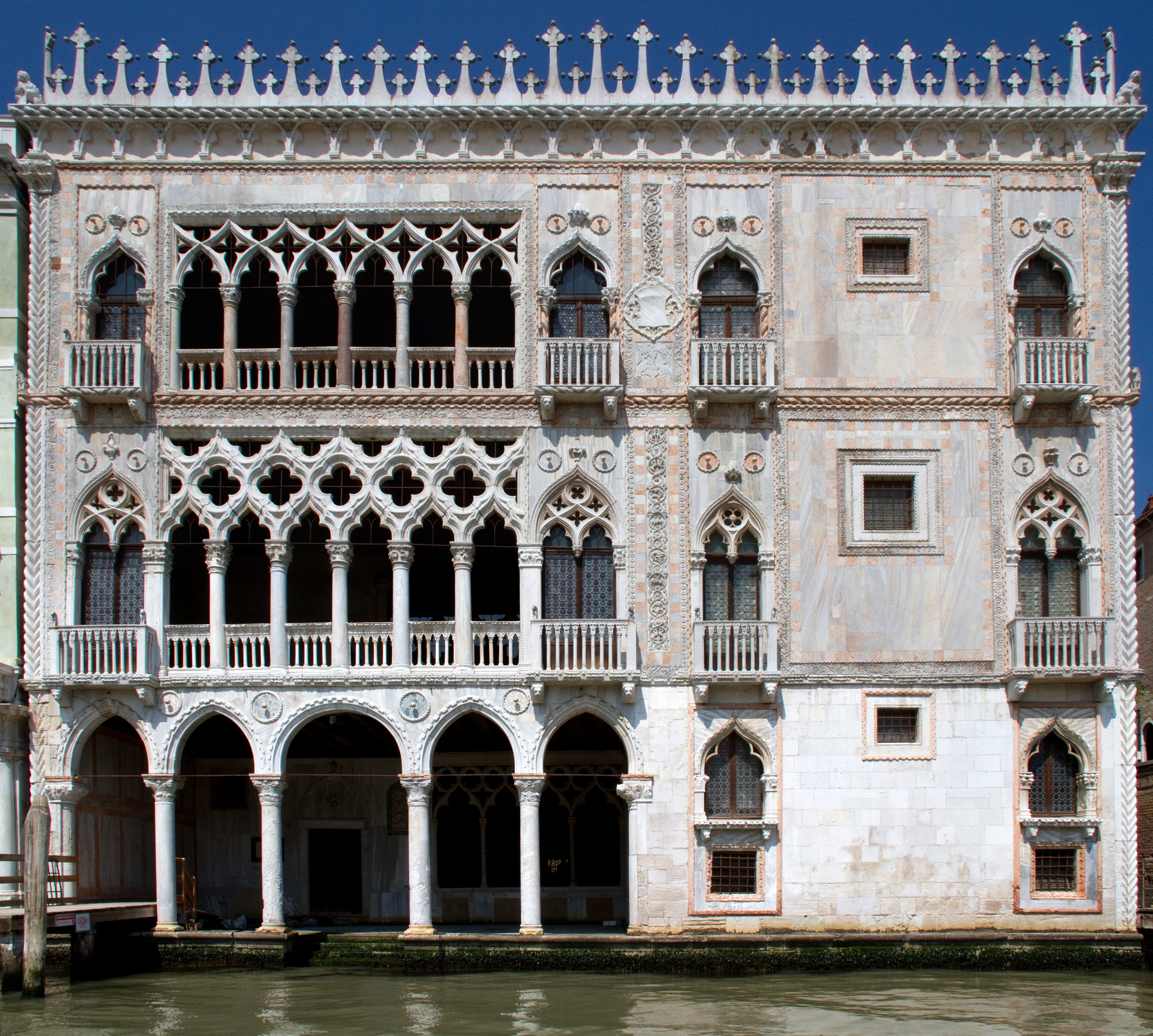 Venice Building